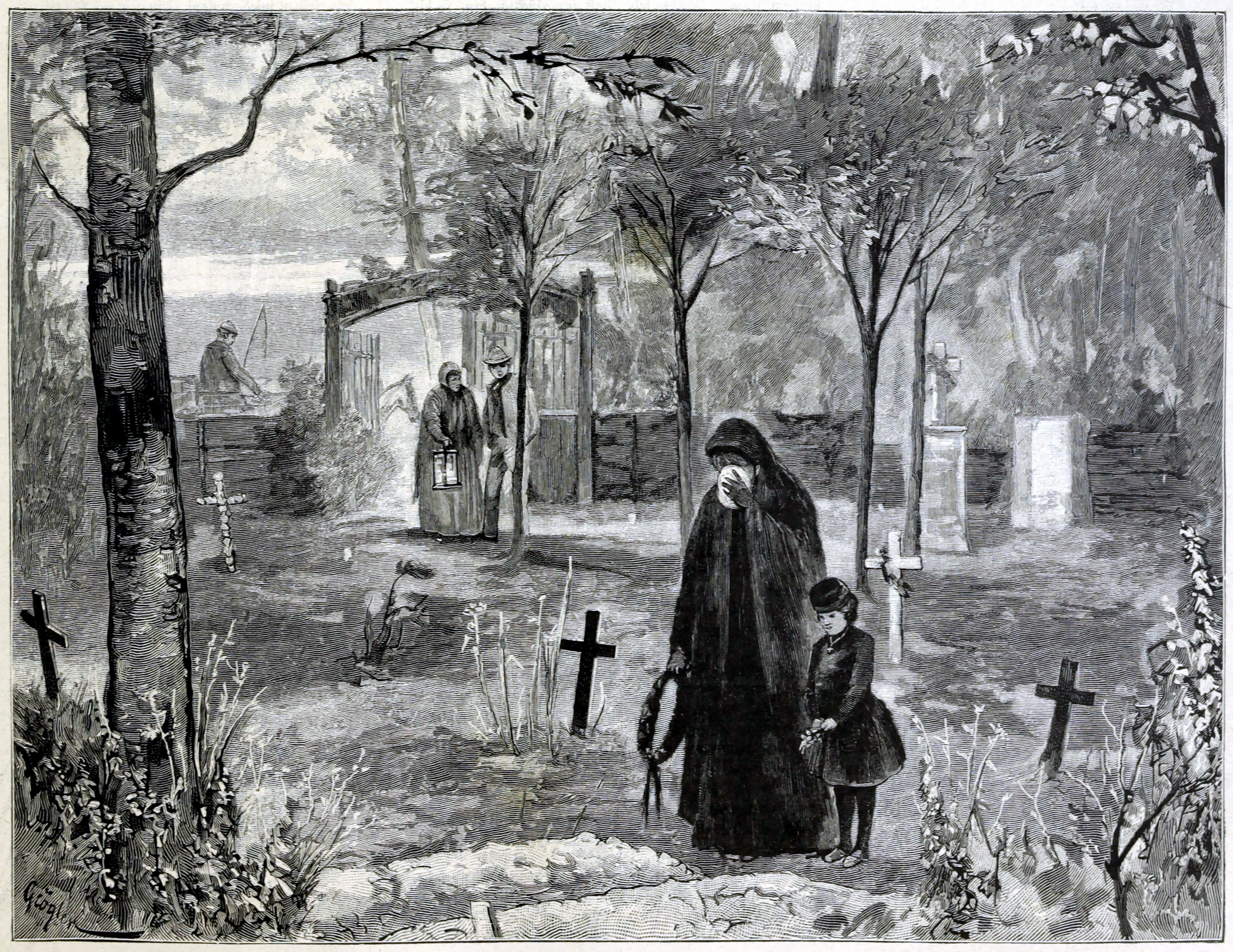 Wien-Albern, (erster) Friedhof der Namenlosen; Darstellung aus Anlass von Allerseelen